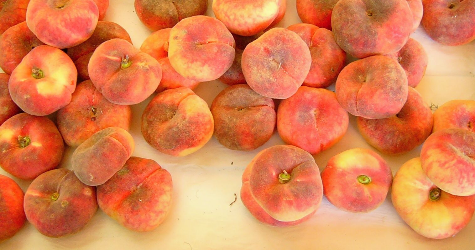 Pesca Tabacchiera - Plattpfirsiche